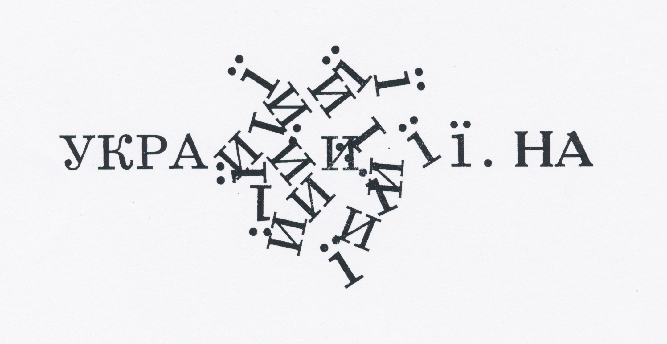 Зоровий вірш